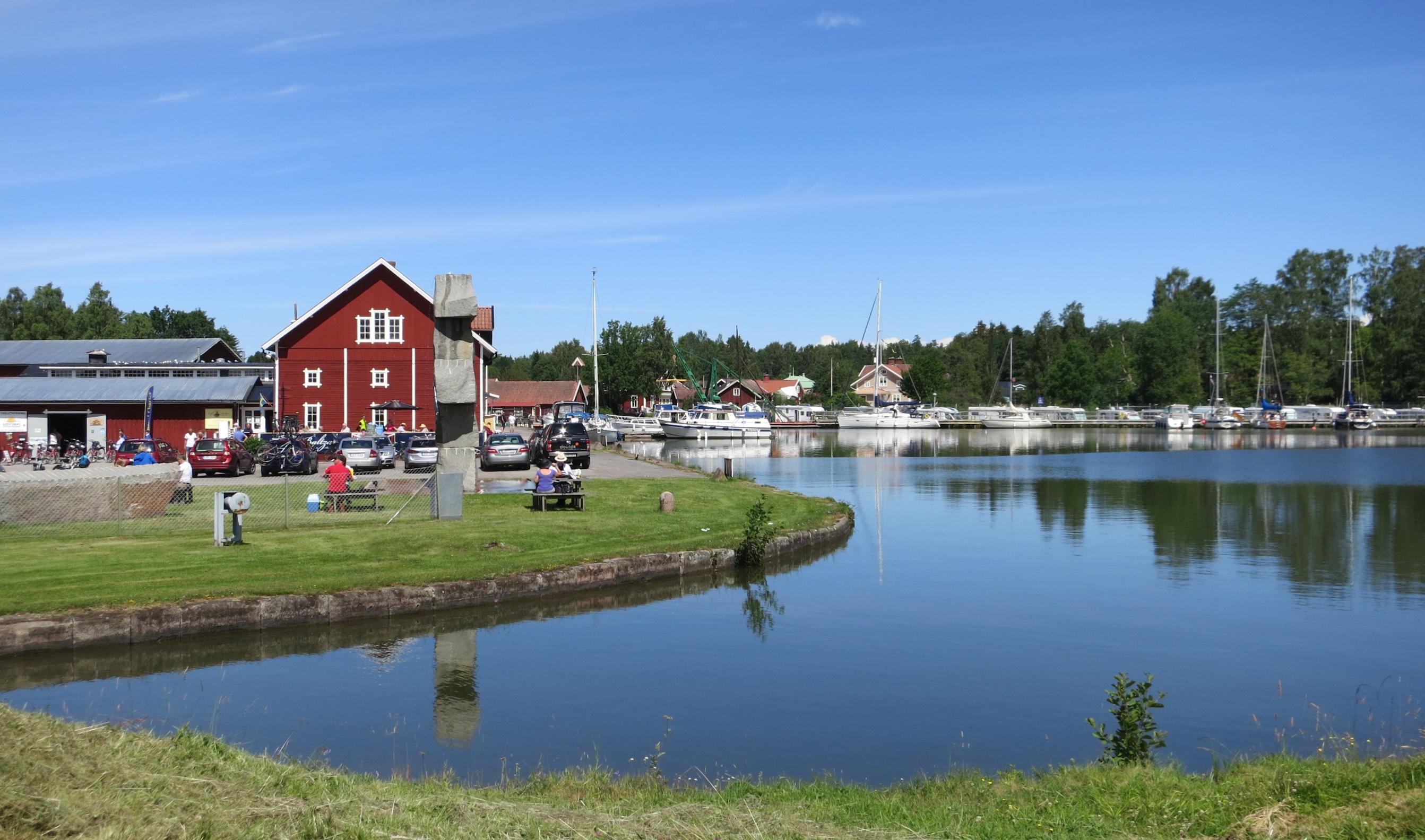 Sjötorp, Göta kanal